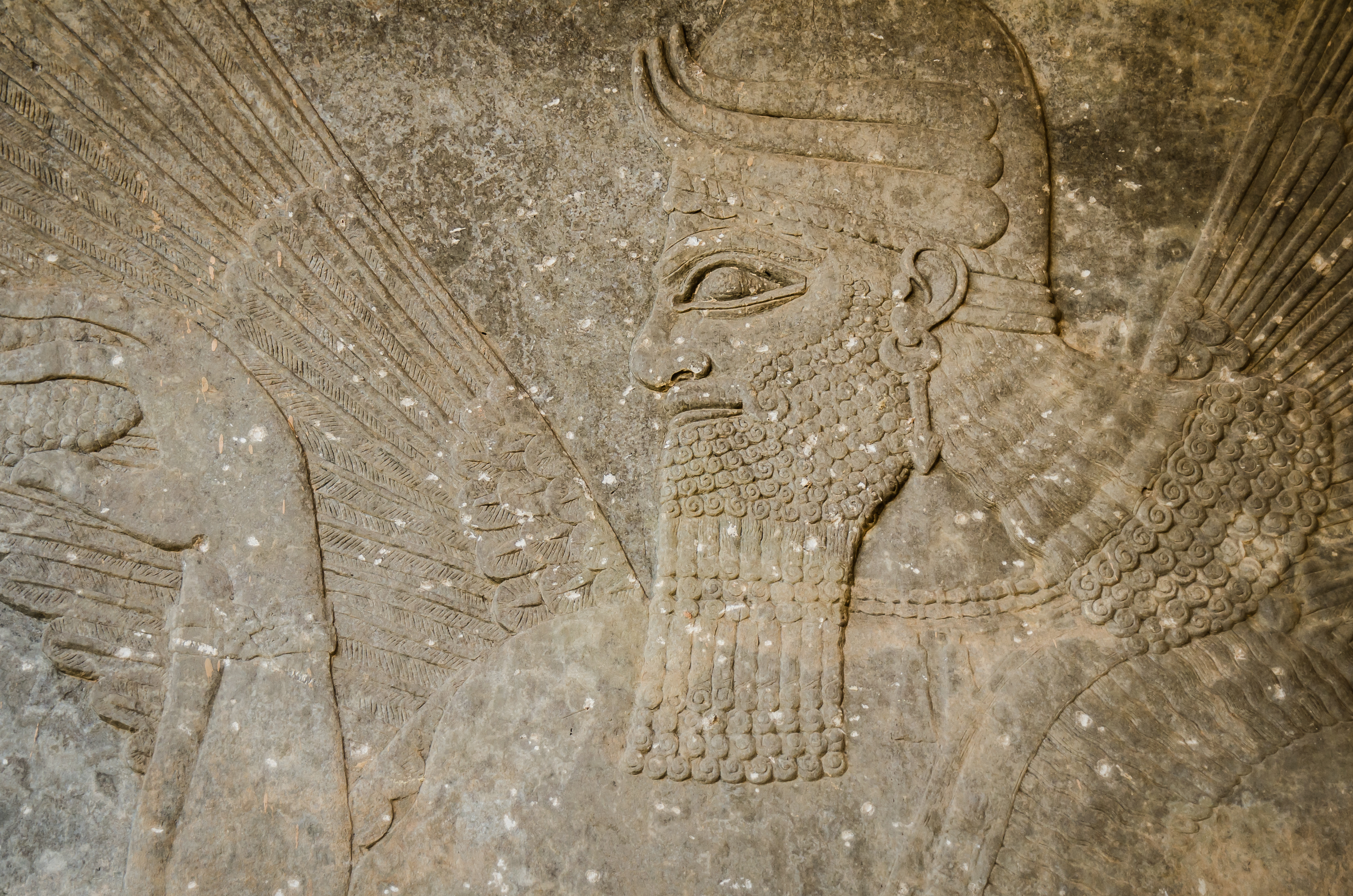 In der fast völlig zerstörten Anlage findet man vereinzelt Bruchstücke der alten Reliefe.